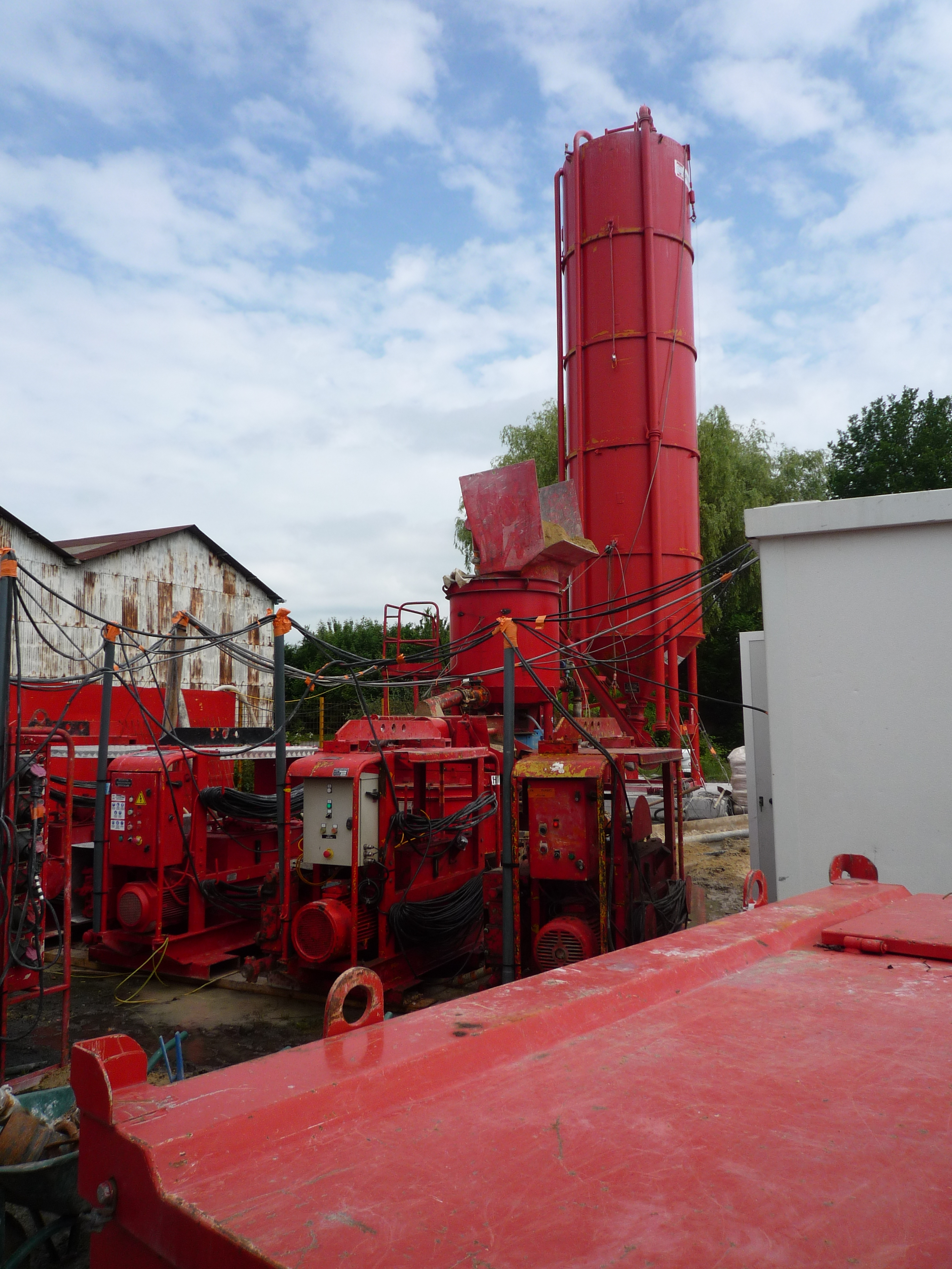 Chantier de comblement d'une carrière souterraine à Anzin, Nord, Nord-Pas-de-Calais, France.